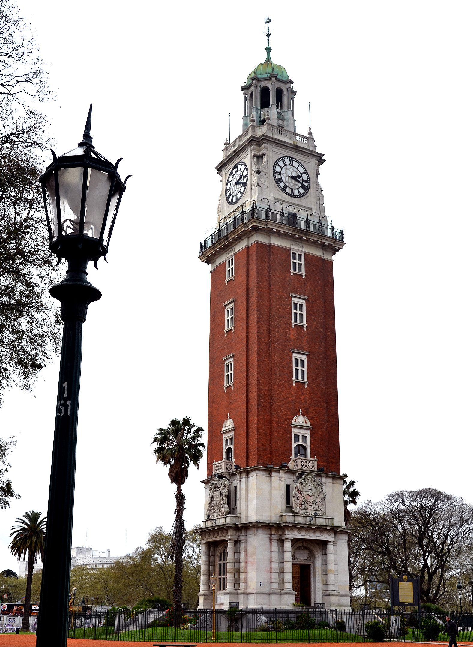 Torre Monumental